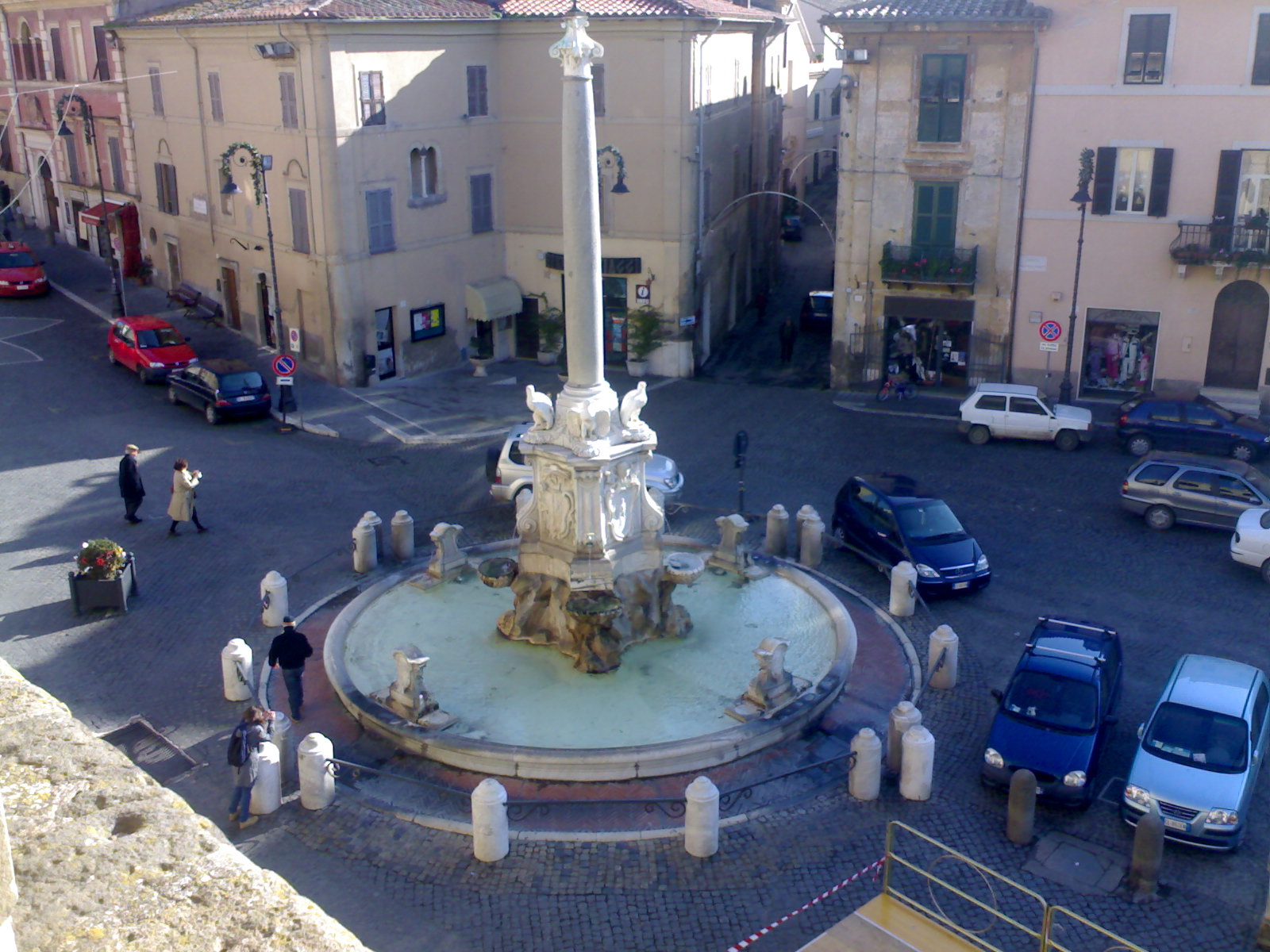 scattata da me